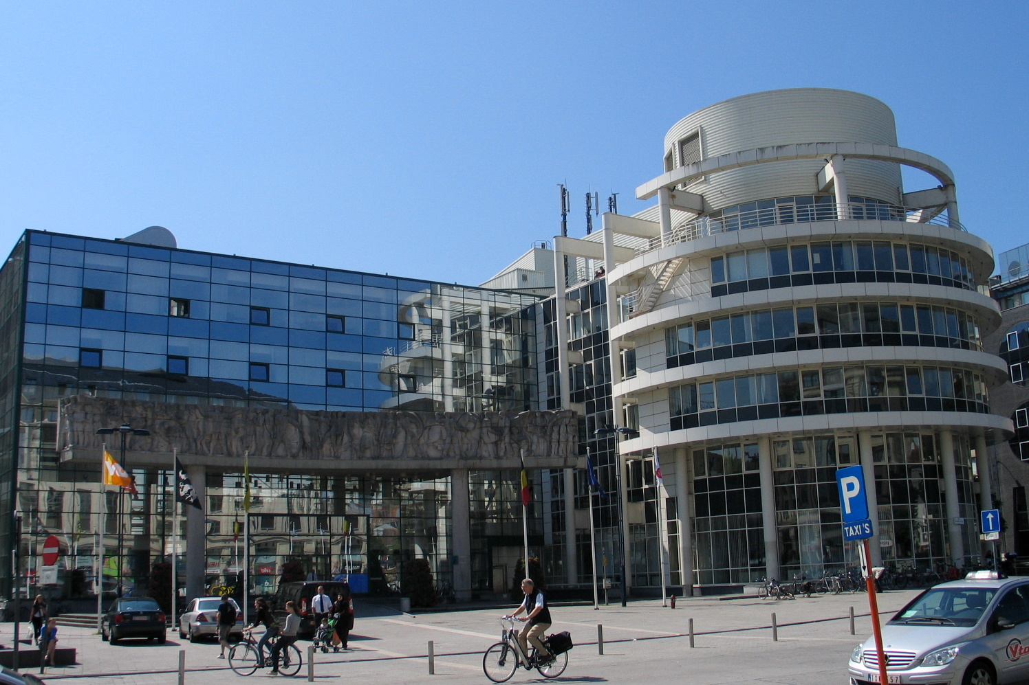 Administratief Centrum van Gent (België) op het Woodrow Wilsonplein